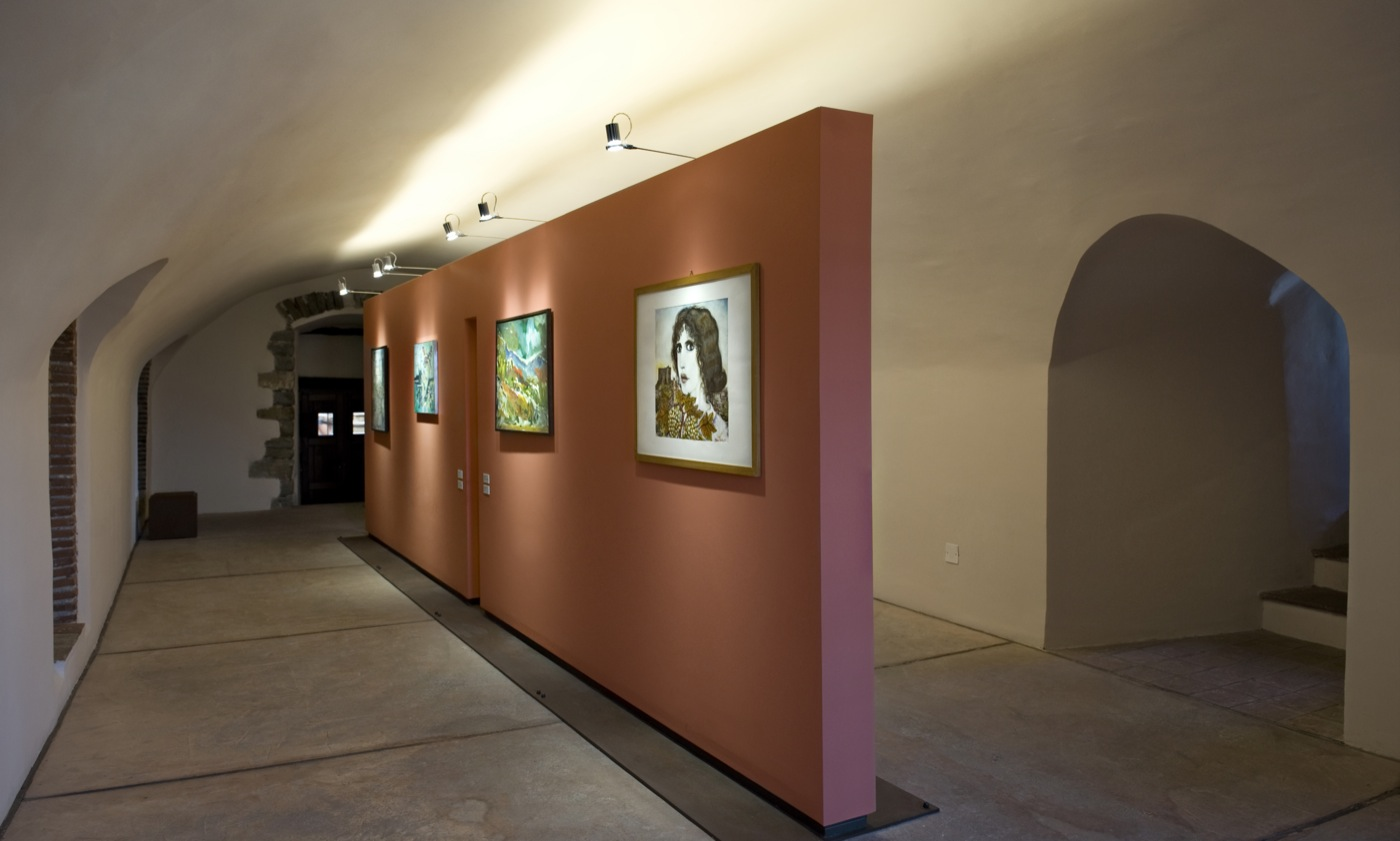 sezione di arte moderna e contemporanea